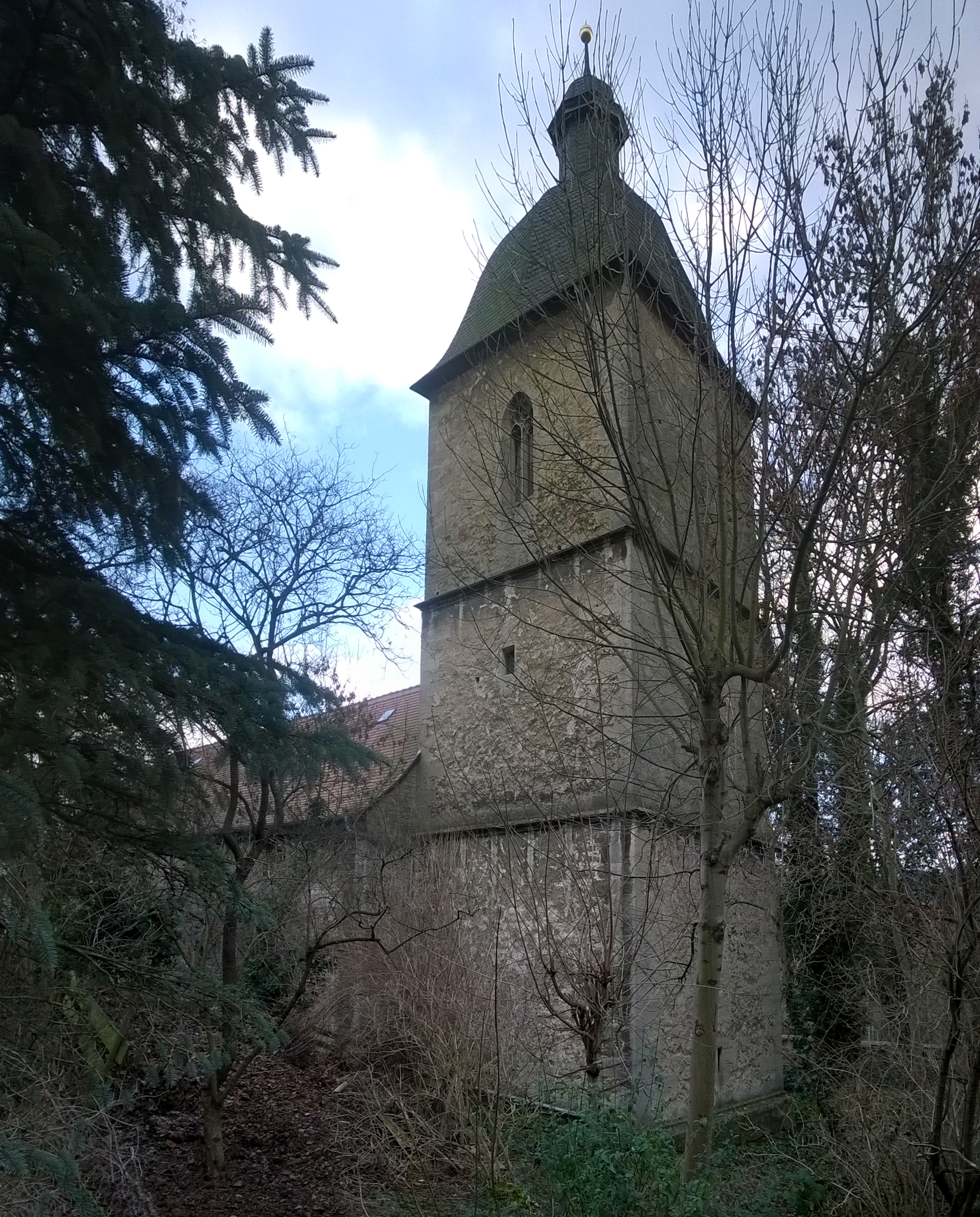 Panorama St. Marien, Kirchgarten, Zwätzen.